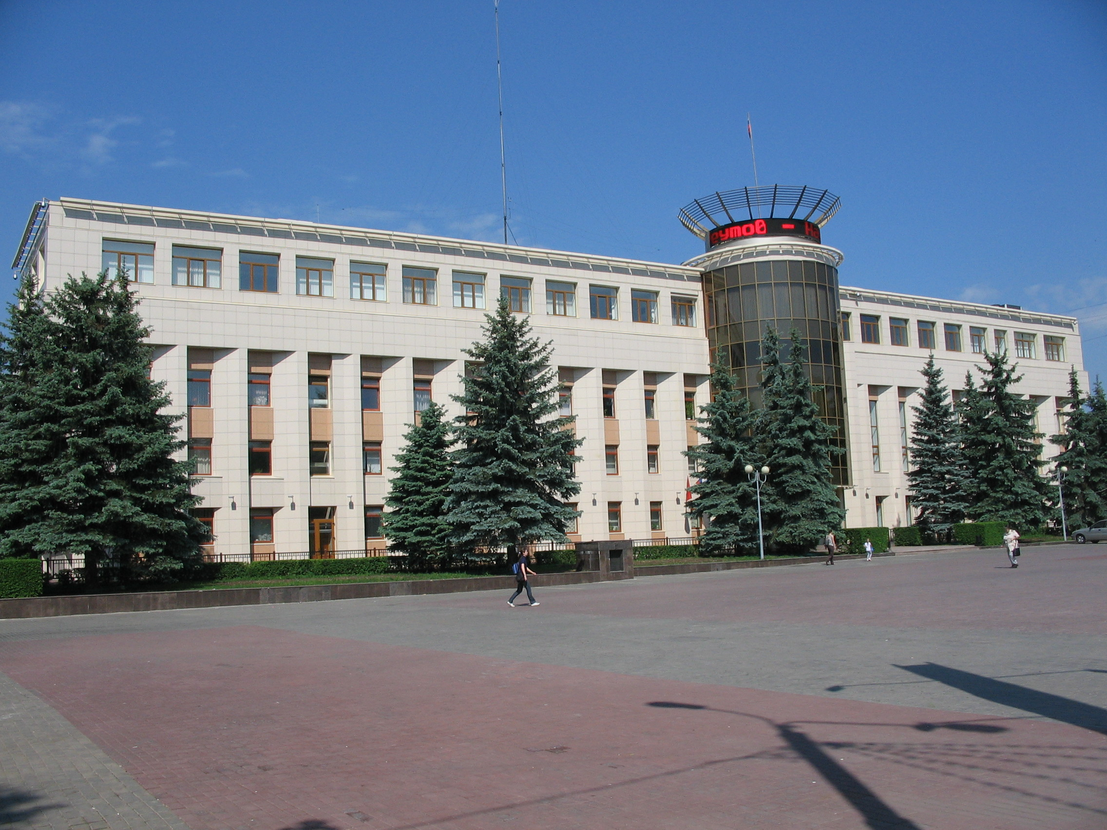 Реутовский городской совет депутатов.